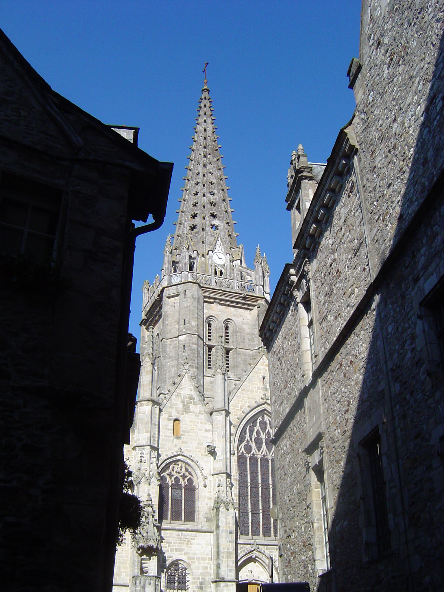 Sacristie et chapelle seigneuriale, transept sud et clocher de l'église Notre-Dame de Vitré.